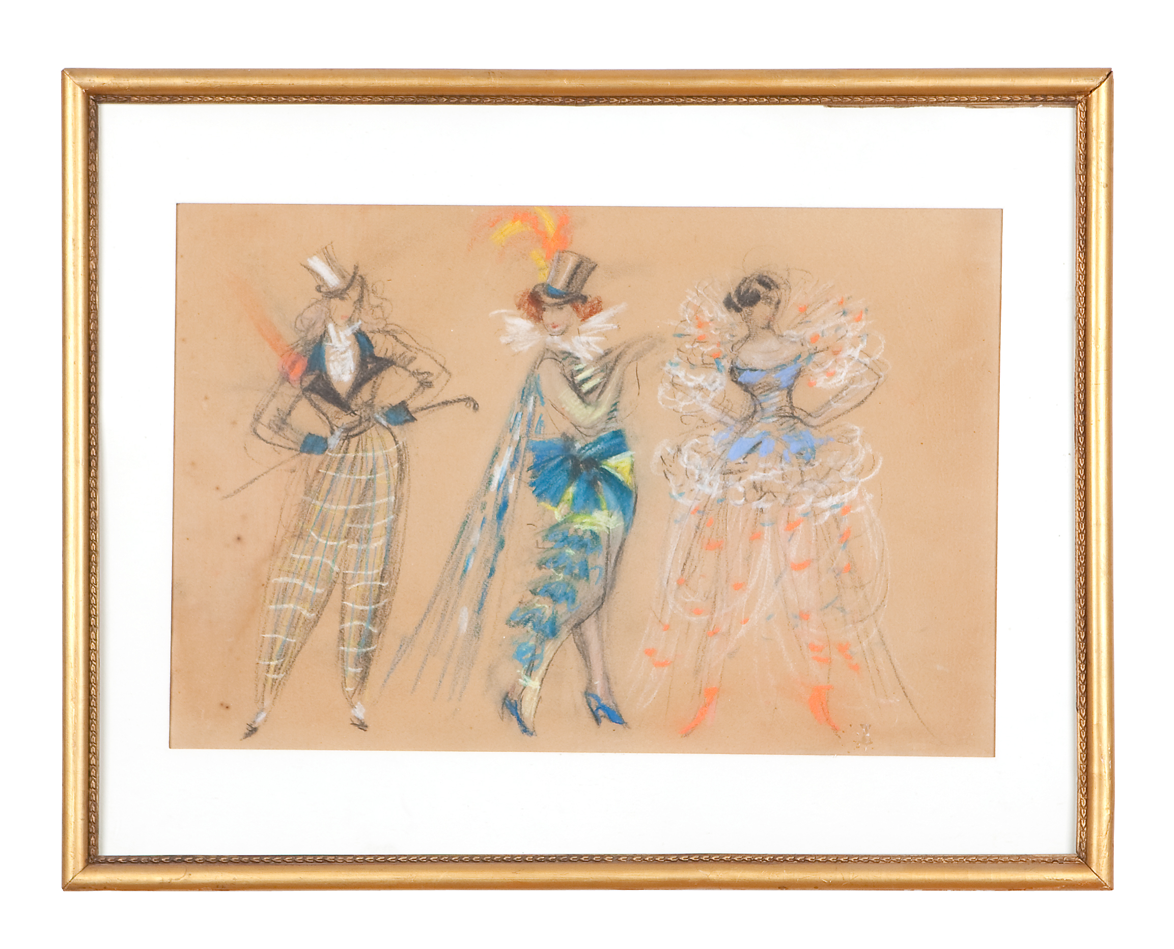 Иллюстрация к произведению М.Ю.Лермонтова Маскарад.Год создания 1950 выполненная маслом на картоне